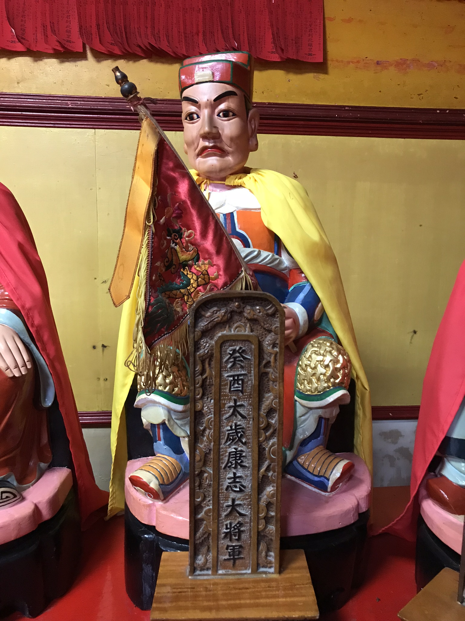 癸酉太歲康志大將軍神像